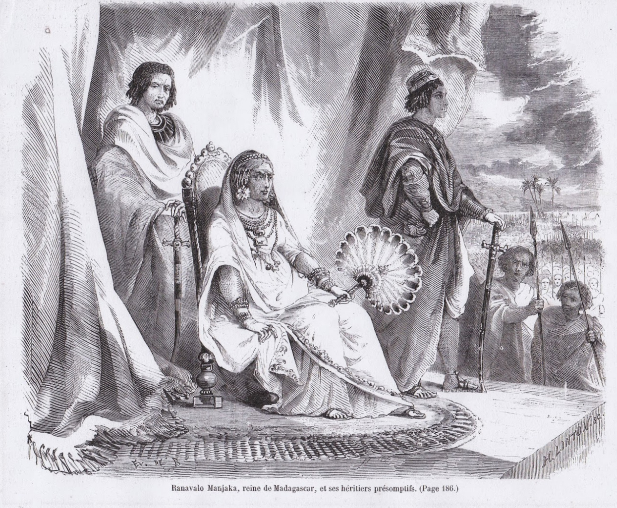 Ranavalo Manjaka, reine de Madagascar, et ses heritiers presomptifs. Wood engraving by H. Linton ca 1875. Light creases in upper image.